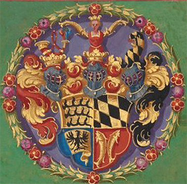 Württemberger Wappen im Seehbuch, darinnen alle Seeh und Weyher in dem löplichen Hertzogthumb Würtemberg von Jacob Ramminger, 1596